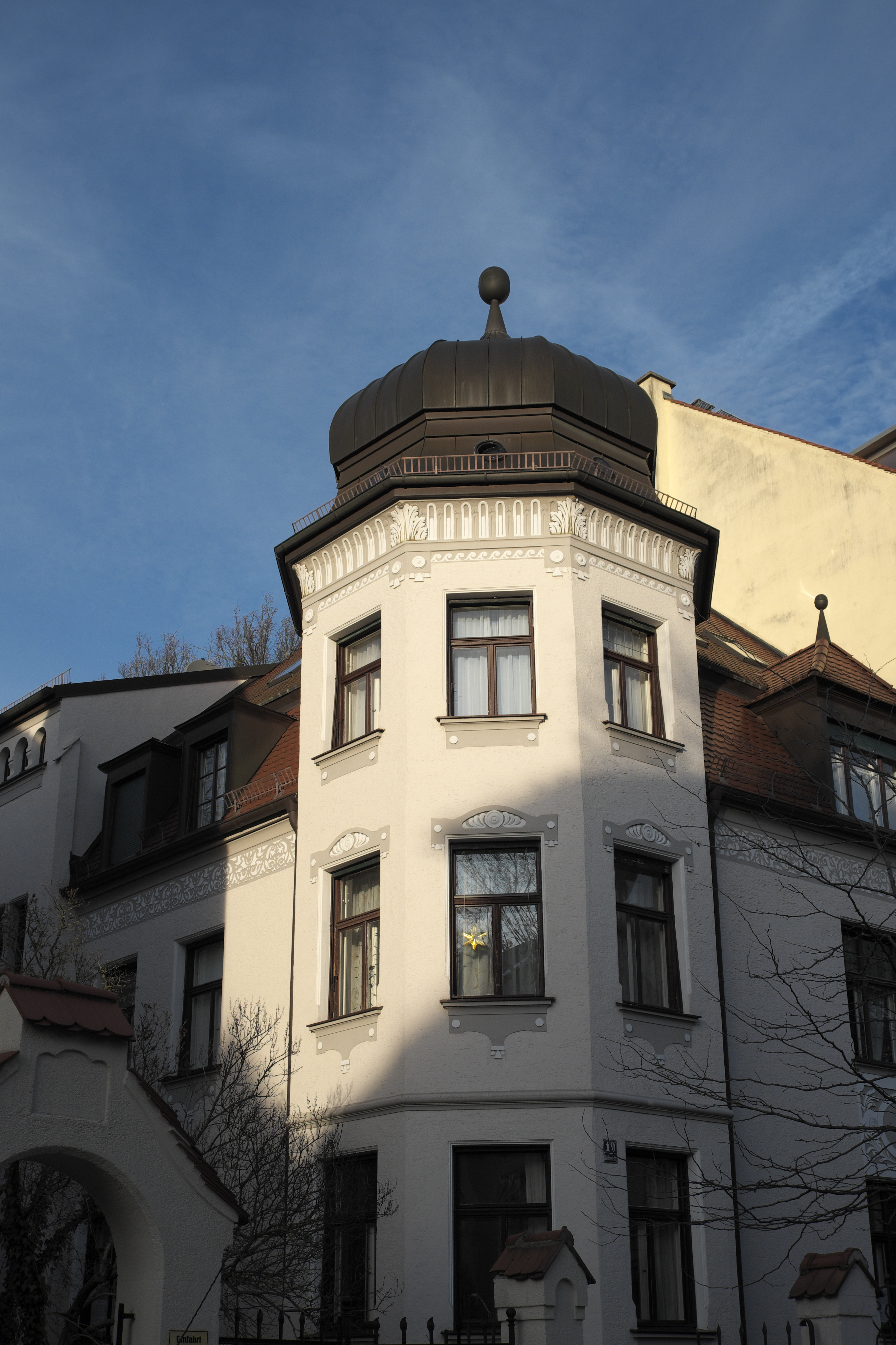 Villa in der Bothmerstraße 19 in Neuhausen im Stadtbezirk Neuhausen-Nymphenburg in München (Bayern/Deutschland)